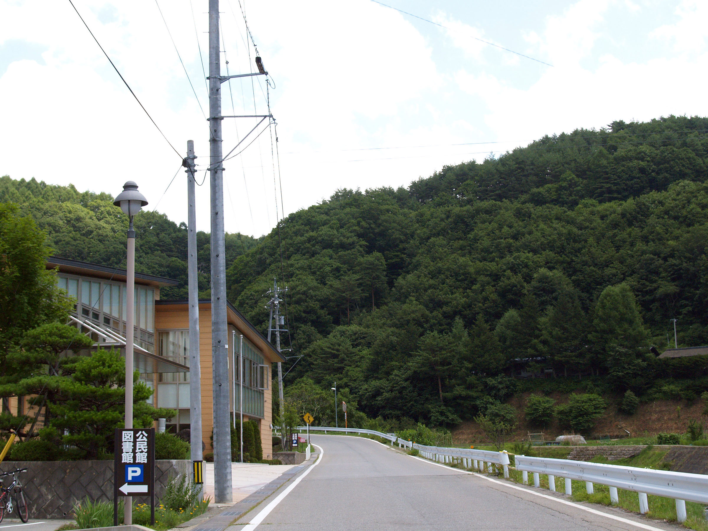 長野県道472号栗尾見上線（南相木村公民館前にて）